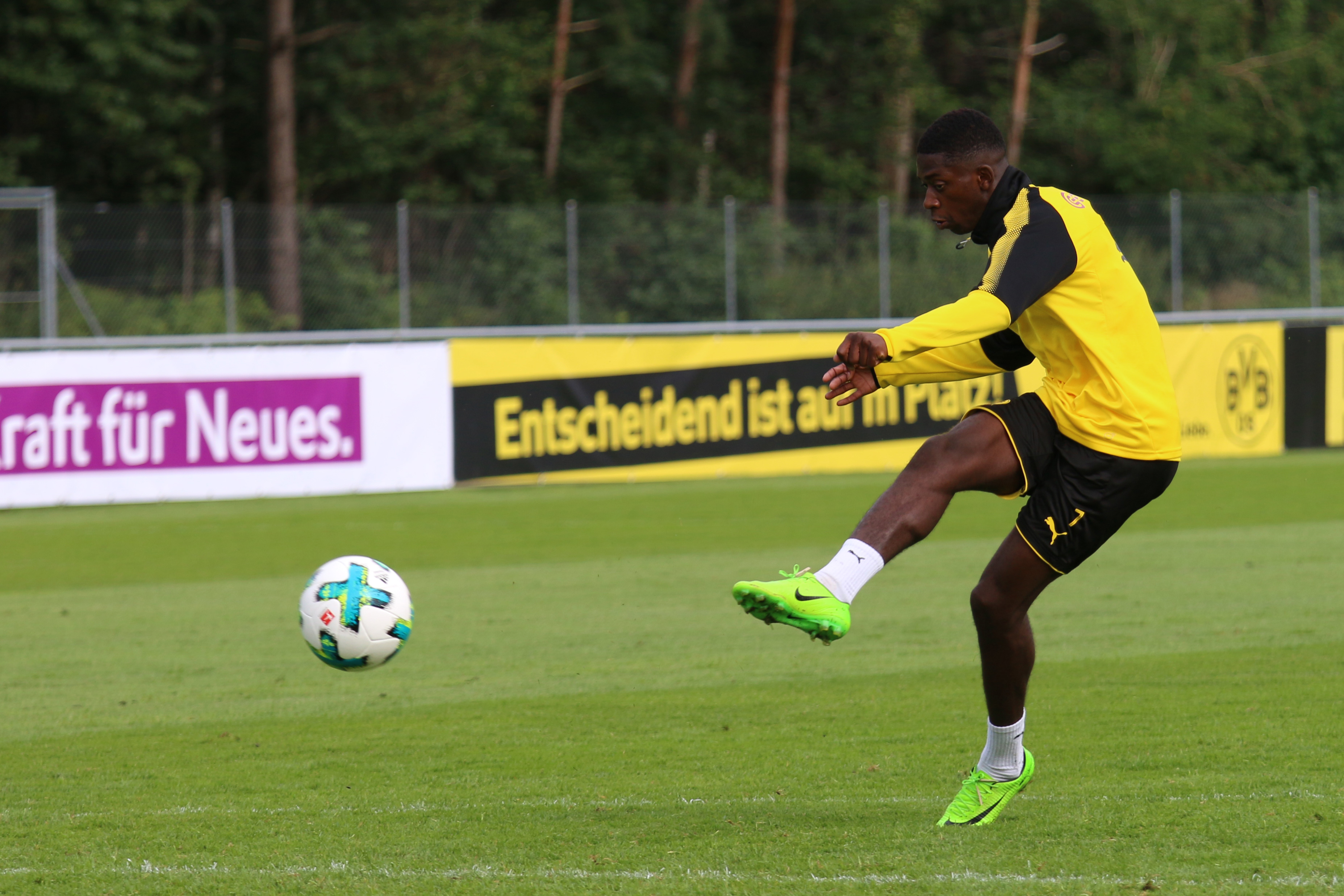 Ousmane Dembélé im BVB Trainingslager in Bad Ragaz 2017